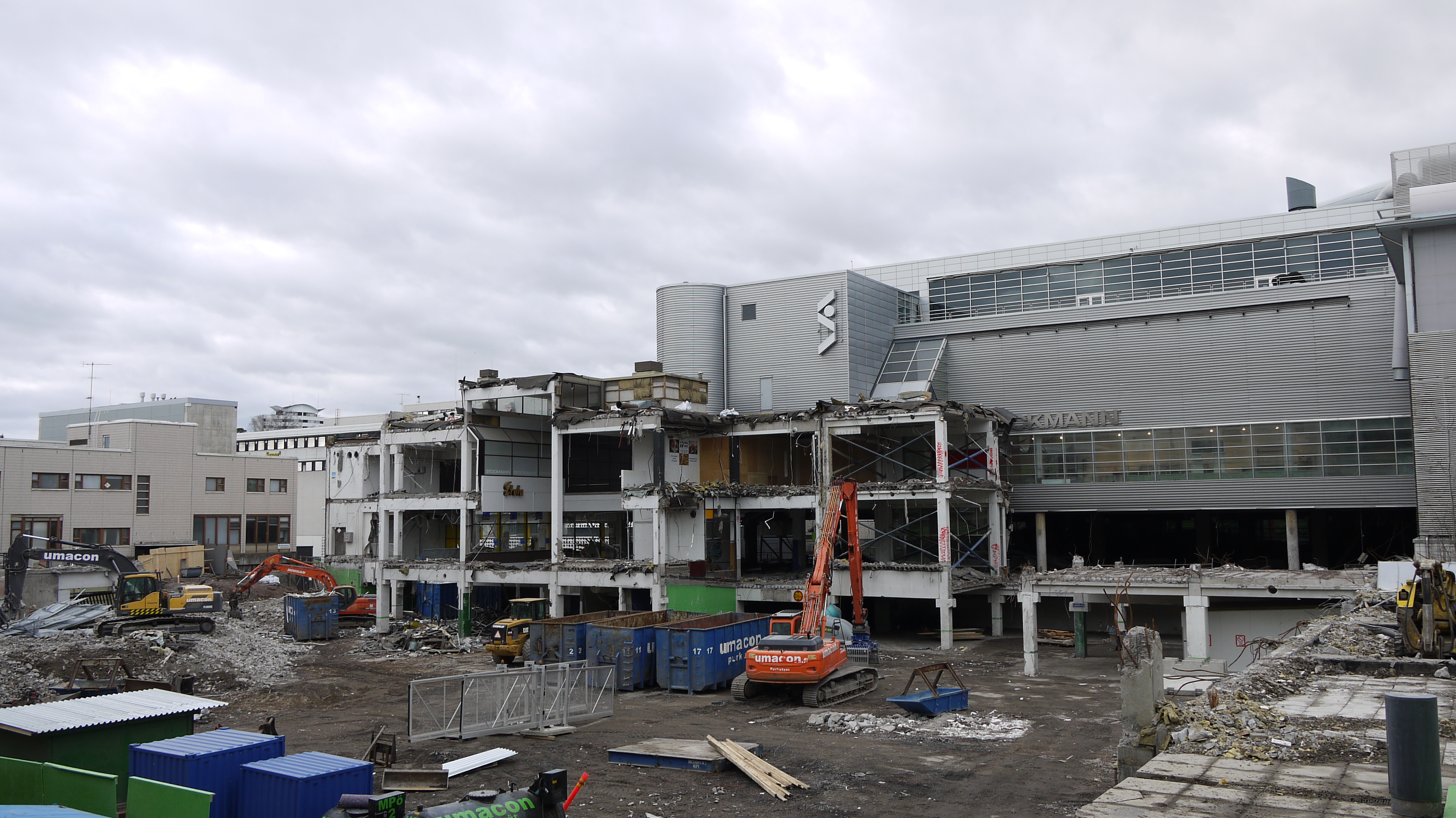 Tapiolan Stockmannin vanhan puolen purkutyöt käynnissä maaliskuussa 2017.